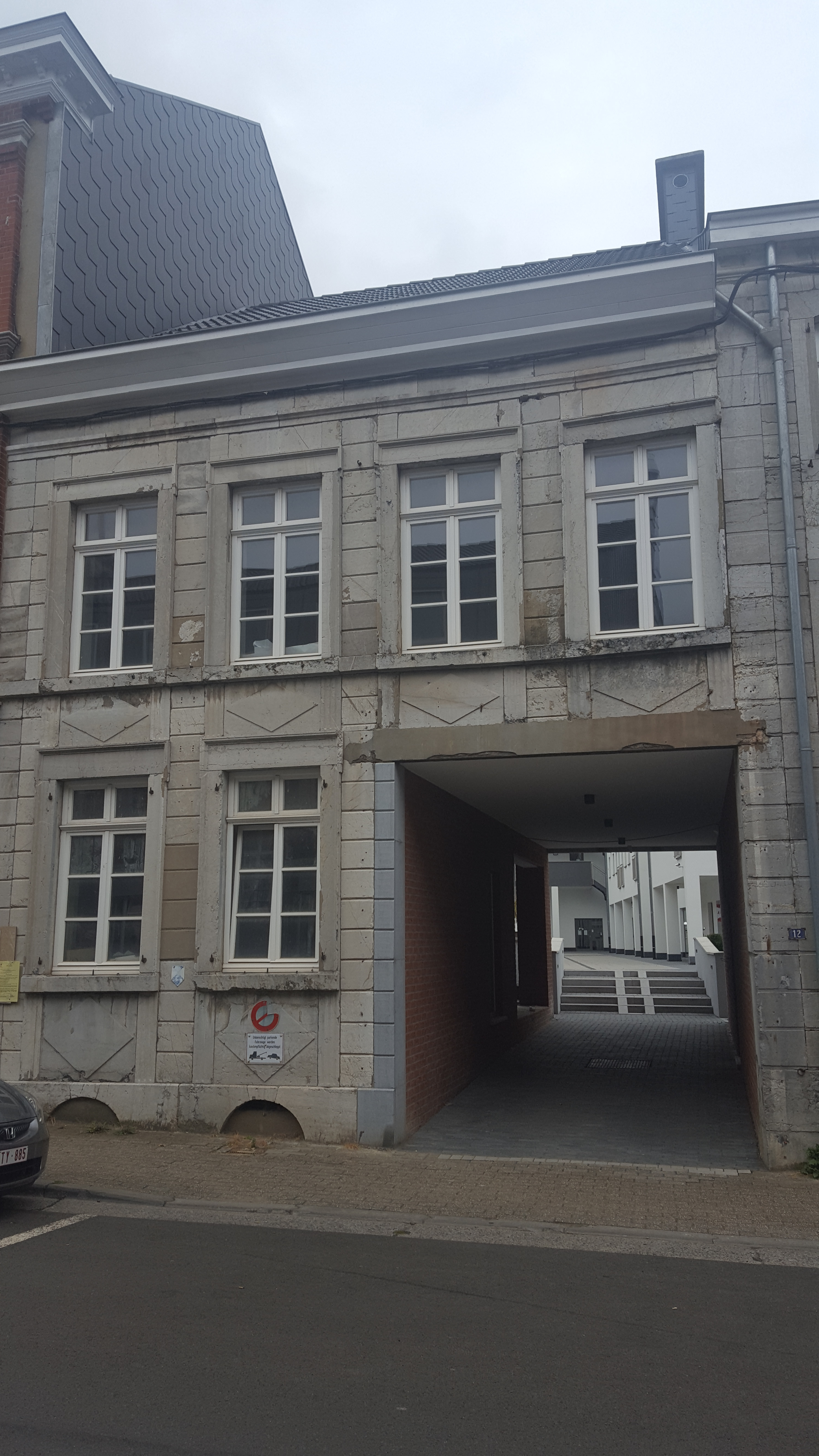 Paveestrasse 12, Eupen, Belgien